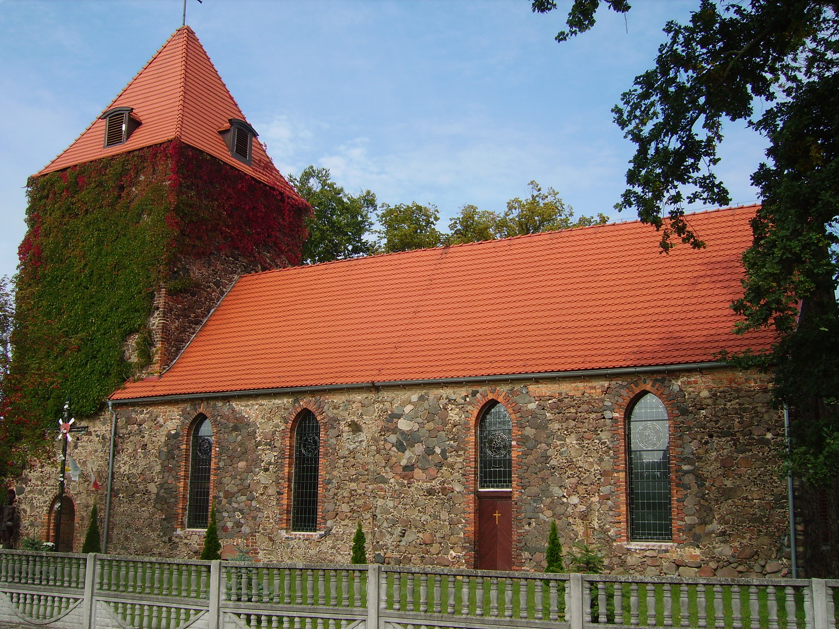 Dąbie, kościół fil. p.w. Najśw. Serca Jezusa, poł. XIII, XVII, XIX